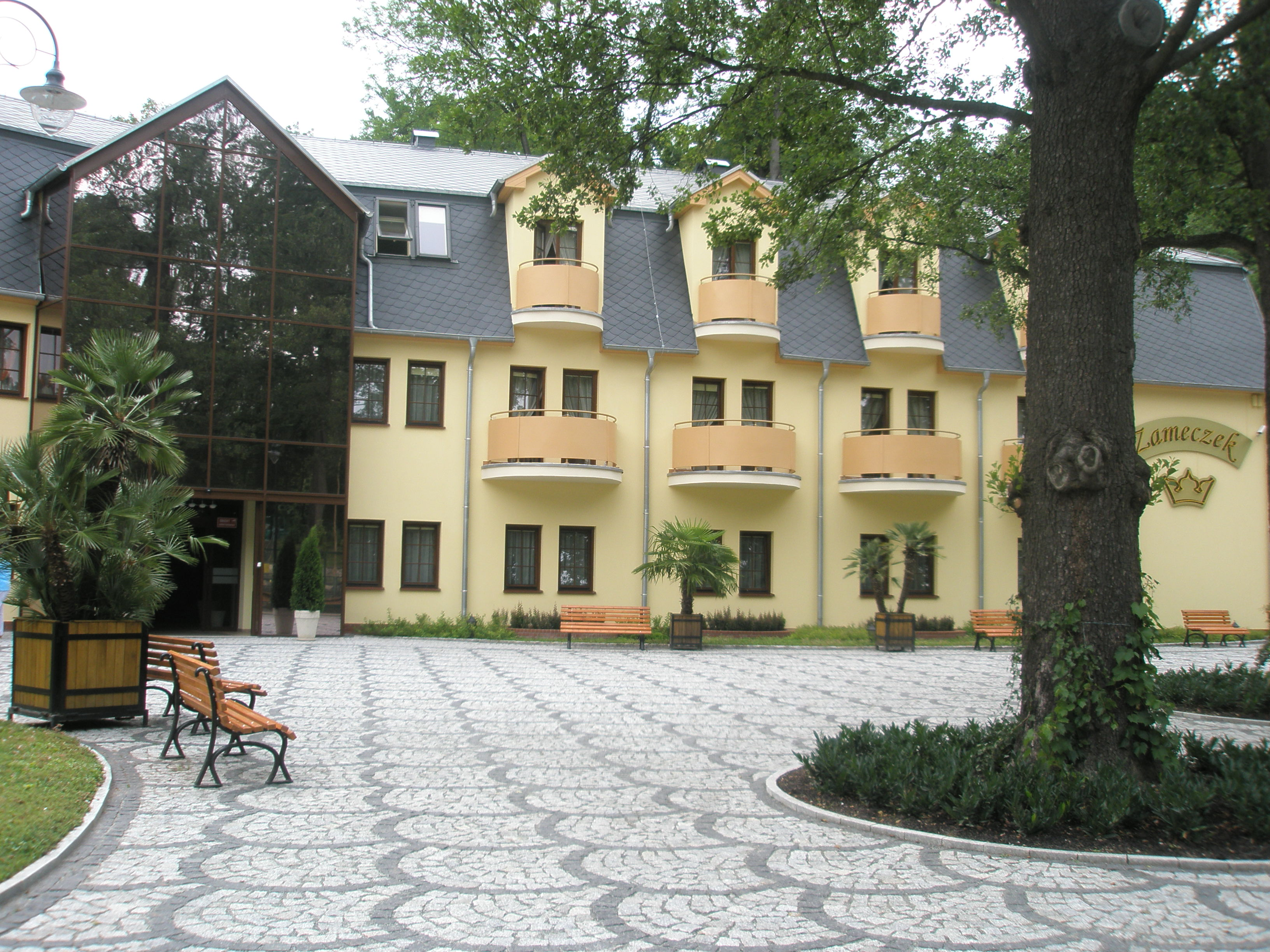 Sanatorium "Zameczek" - nowa część - w Kudowie-Zdroju